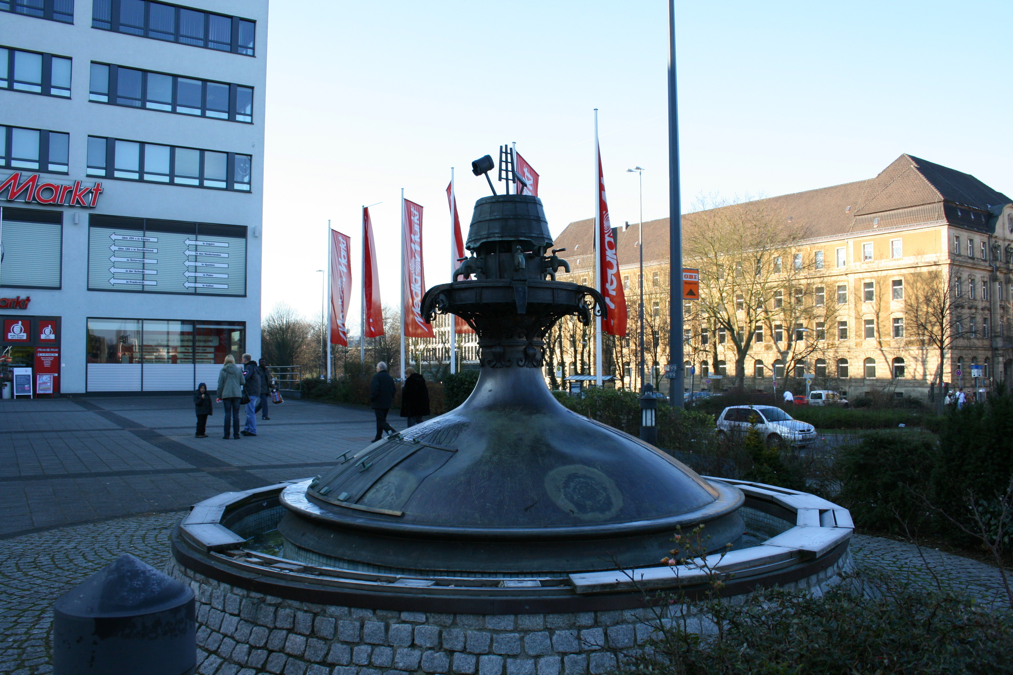 Wickülerbrunnen in Wuppertal